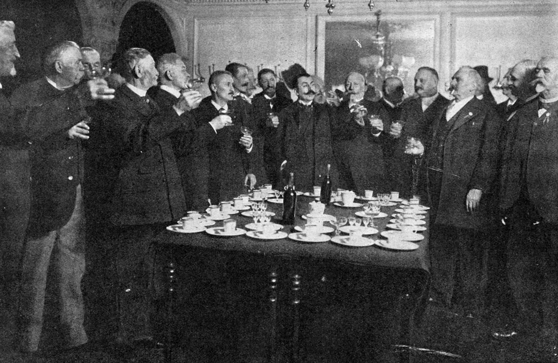 Banquet annuel du dimanche 30 novembre 1902 regroupant les survivants de l'escadron des cent-gardes sous la présidence du baron Albert Verly, fils de l'ancien colonel commandant l'escadron.